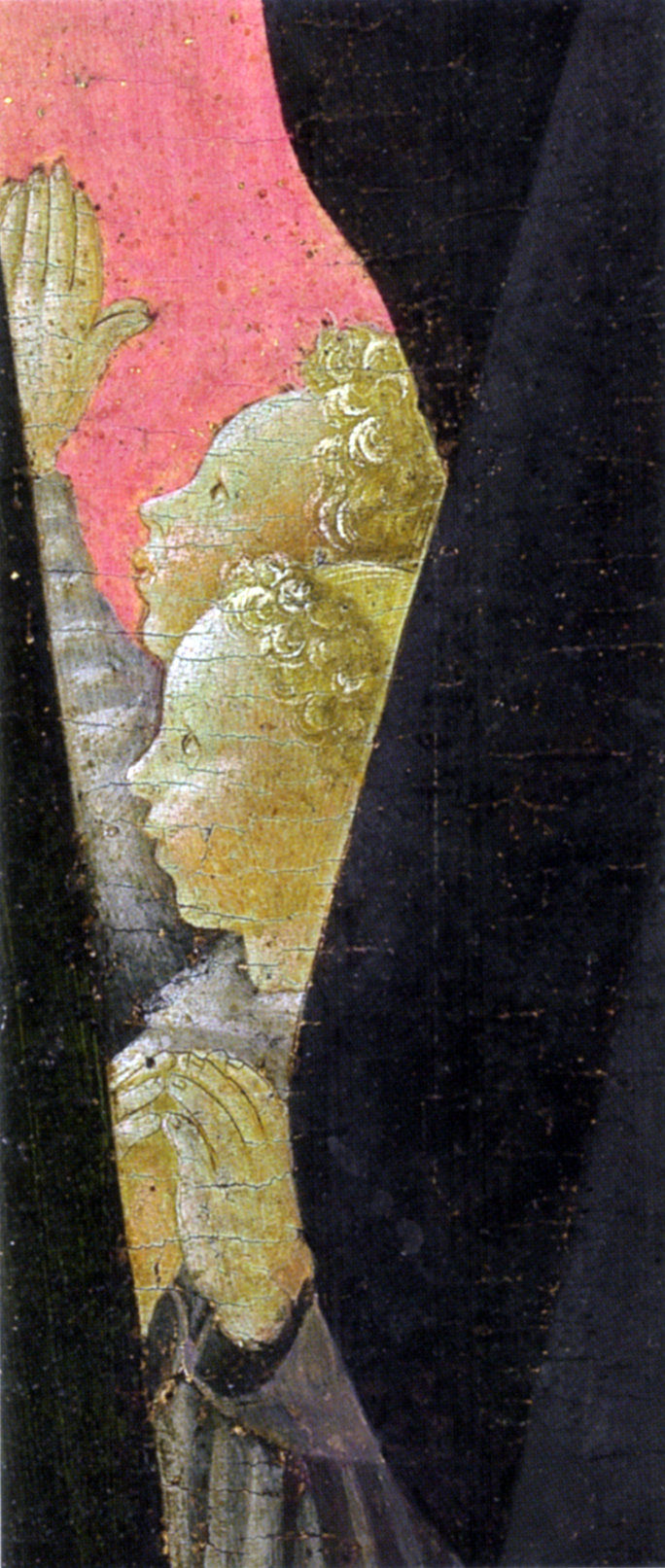 Paolo uccello, santa monaca, 02.jpg